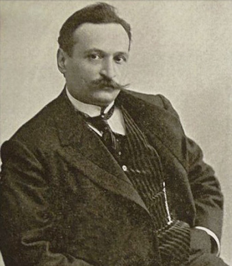 Depicted person: Tevfik Fikret – Ottoman poet